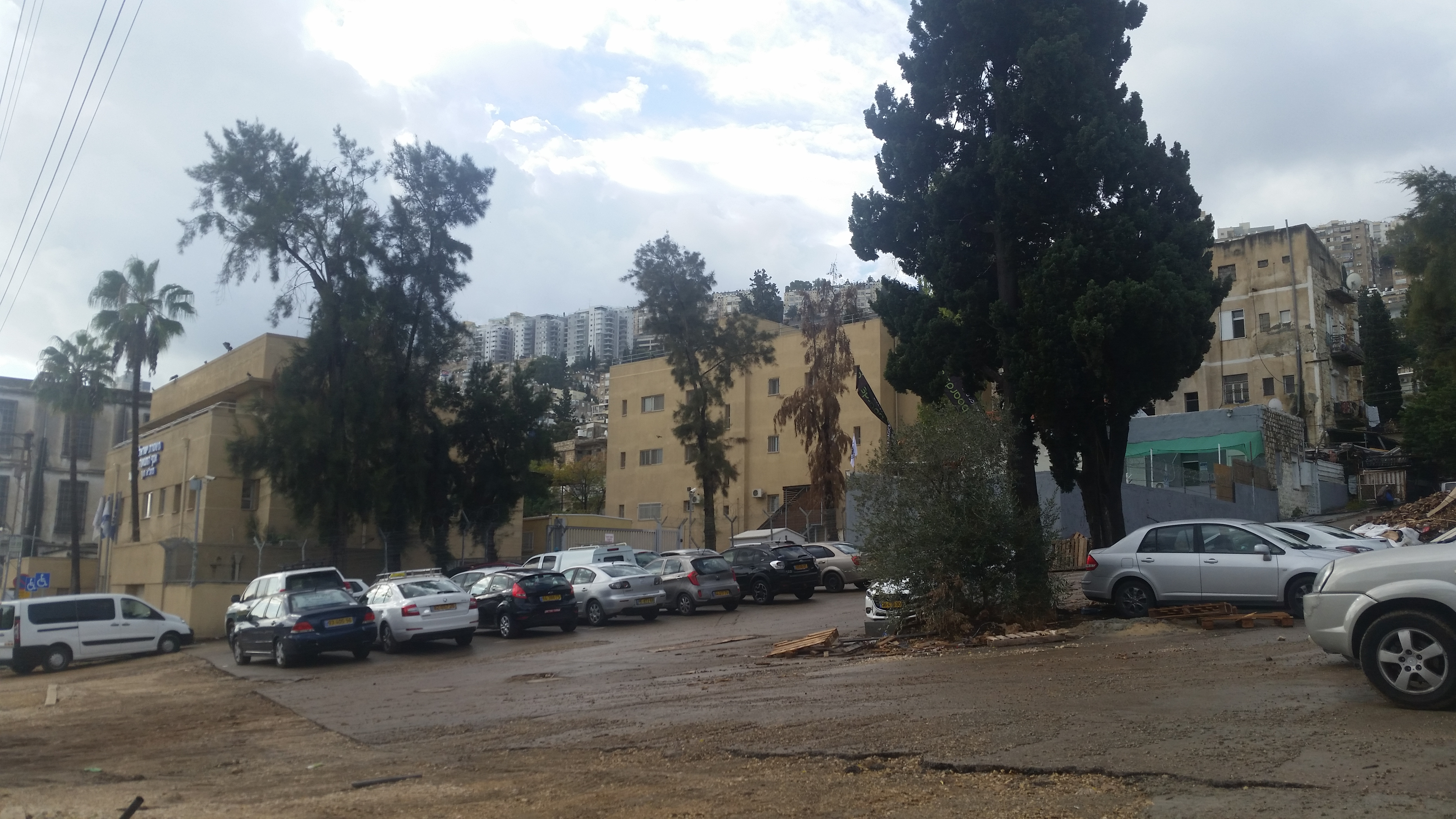 בניין משטרת התנועה בדרך בר יהודה בחיפה. מבנה טאגרט ששימש את משטרת חיפה שנים רבות עד שנבנה הבניין החדש בקרבתו ברחוב נתן אלבז. מימין למבנה מגרש חניה ומבנה ערבי ששרד מתקופת המנדט ששימש למגורים לפני שעבר לשימוש המשטרה.